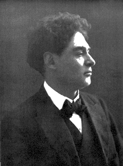 Harold Bauer - Project Gutenberg eText 15604 From